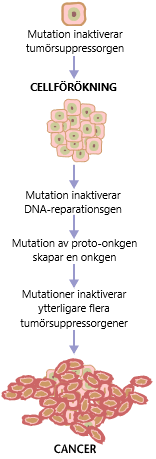 Cancer uppkommer av att mutationer ändrar gener i cancercellen. Skapad utifrån File:Cancer requires multiple mutations from NIHen.png.